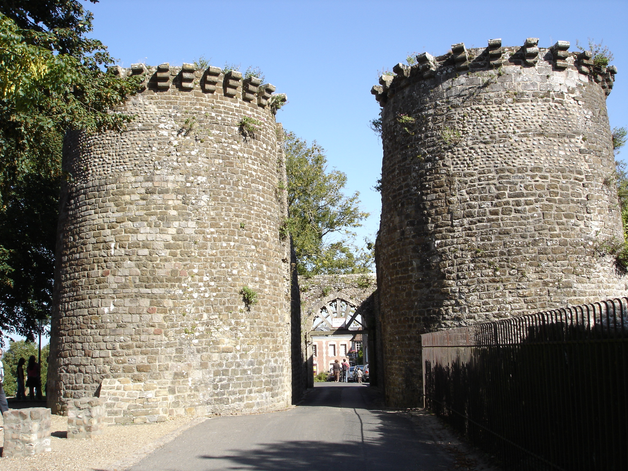 Porte Guillaume, (Classé, 1907) .